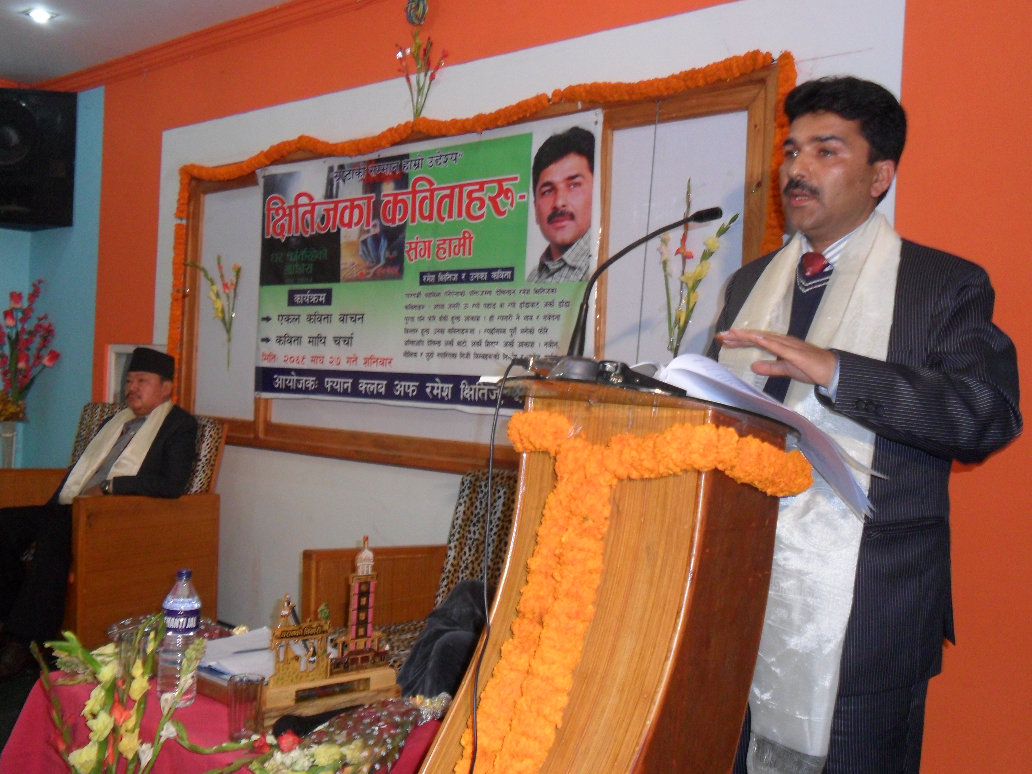 नेपाली: Nepal